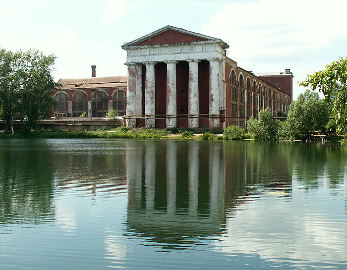 Бетонный корпус ткацкого производства (1915), арх. И. В. Брюханов